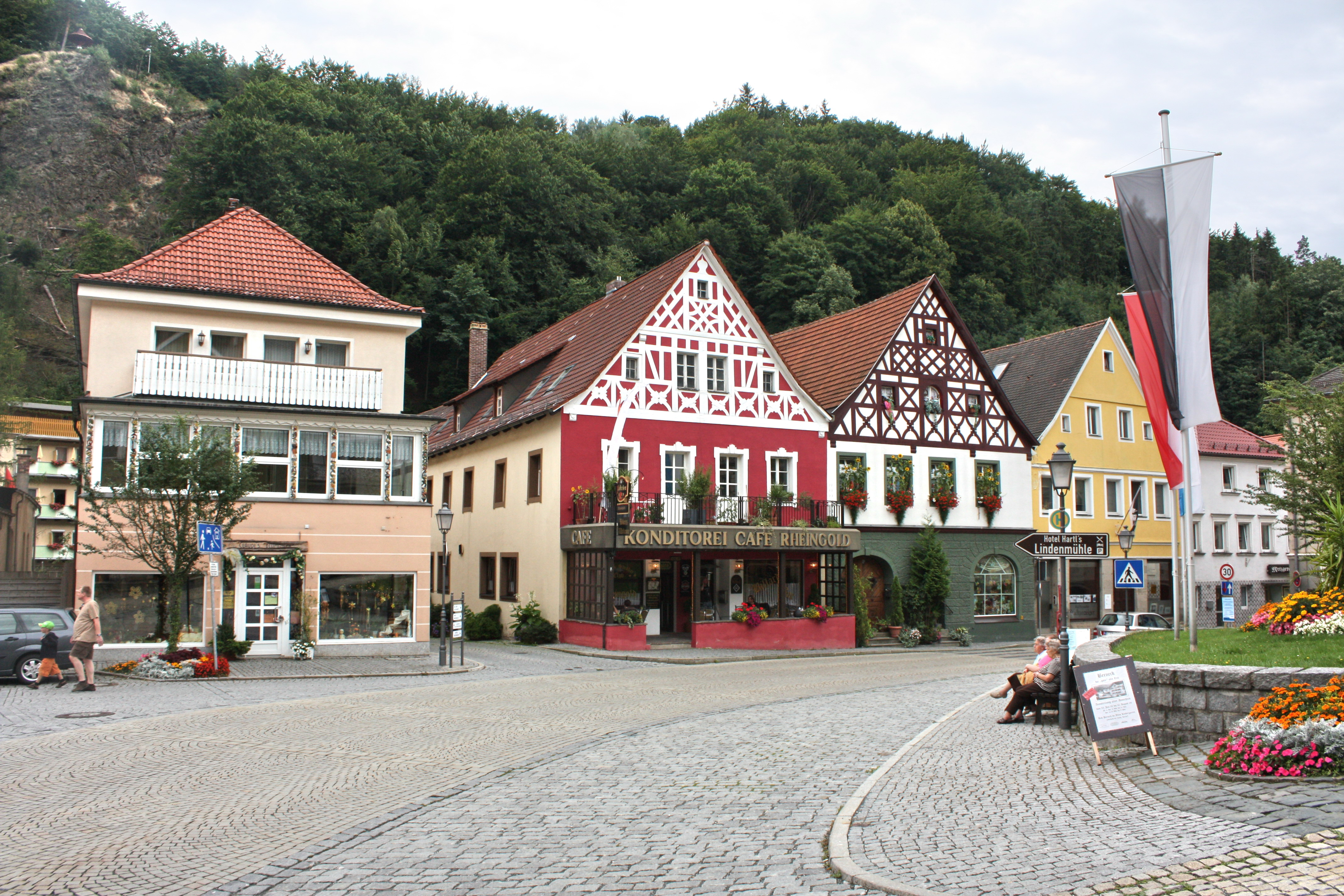 Marktplatz zu Bad Berneck